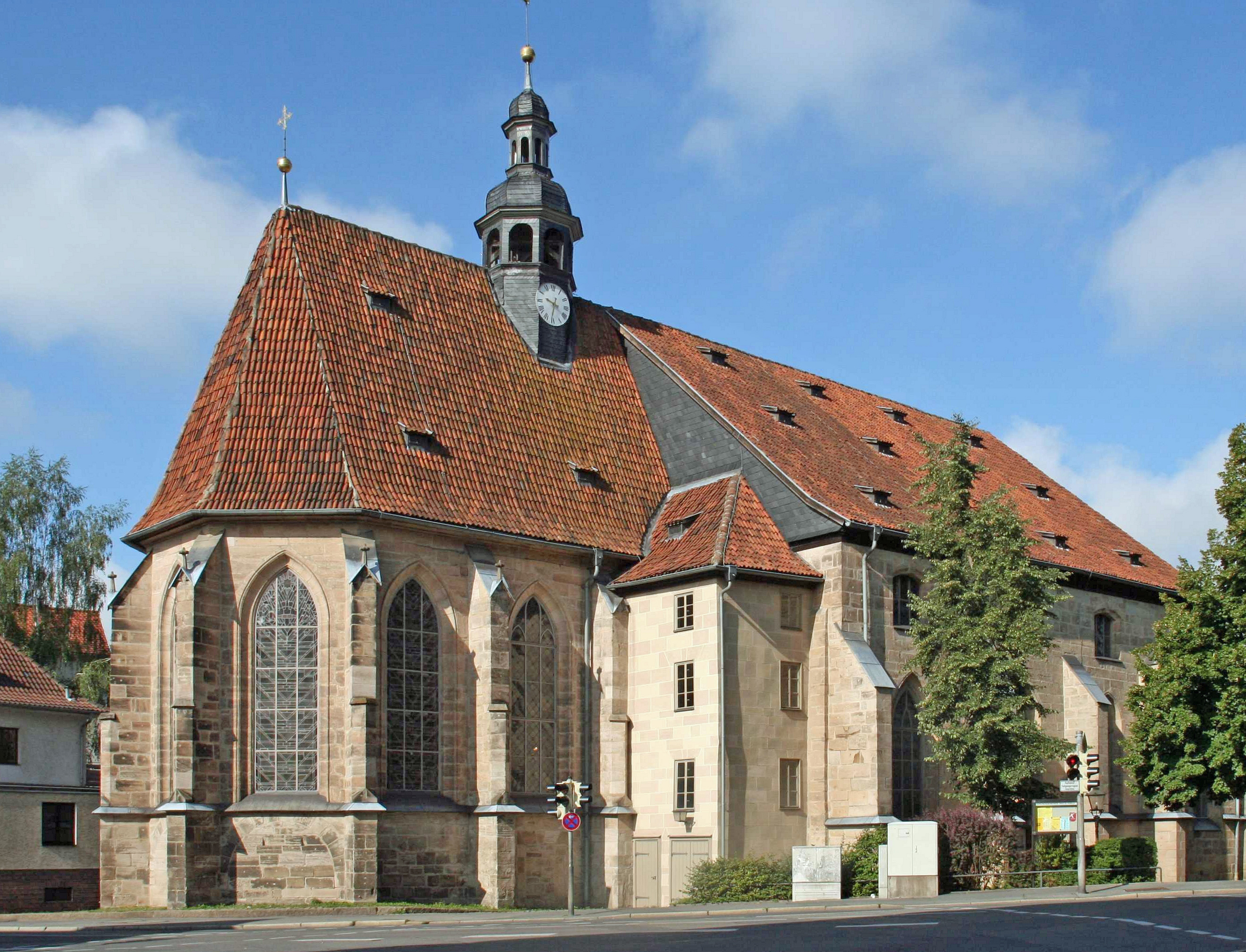 Ev. Heiligkreuzkirche, Hintere Kreuzgasse 15, Coburg